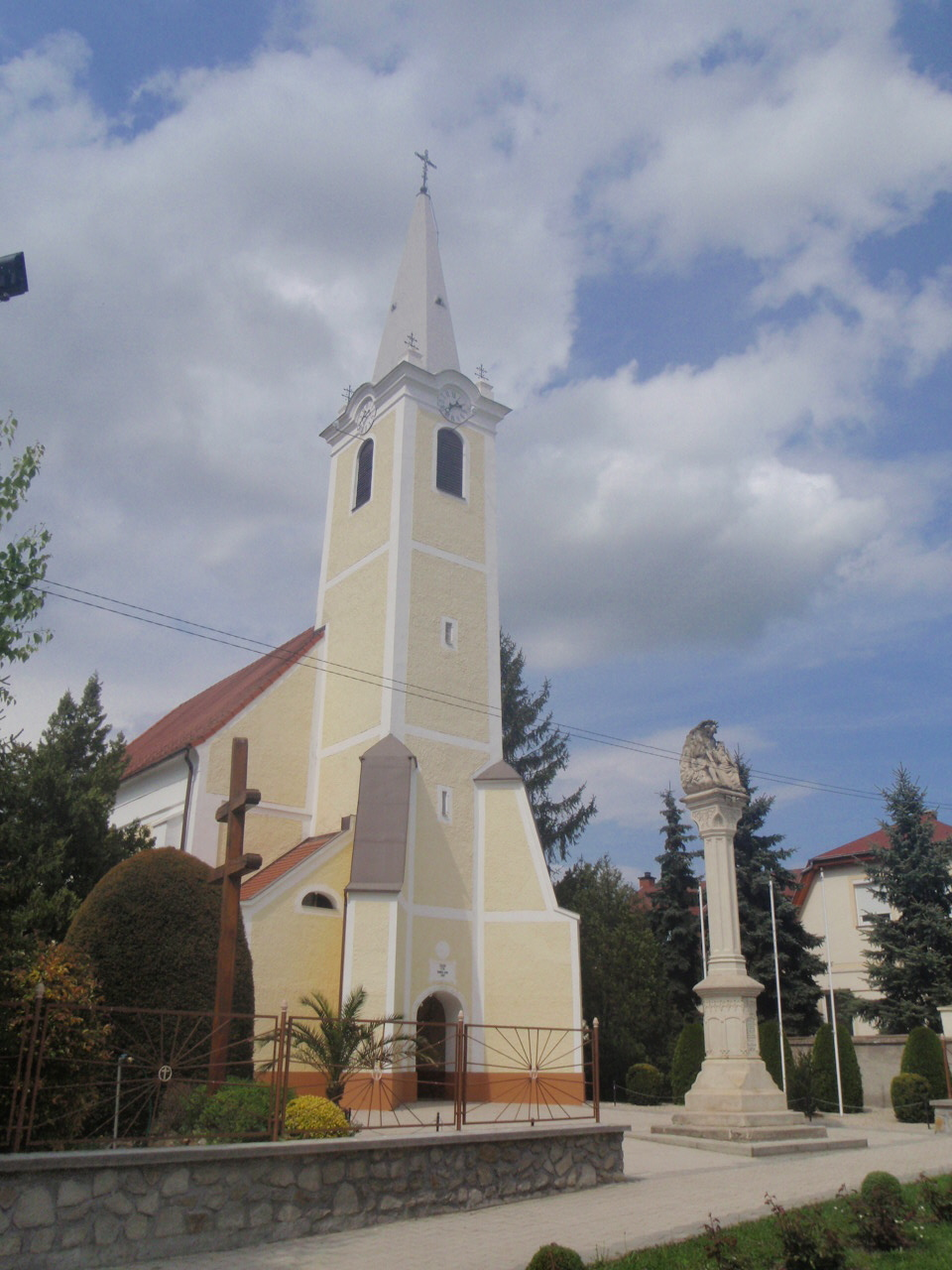 Sankt Martin Kirche, Und